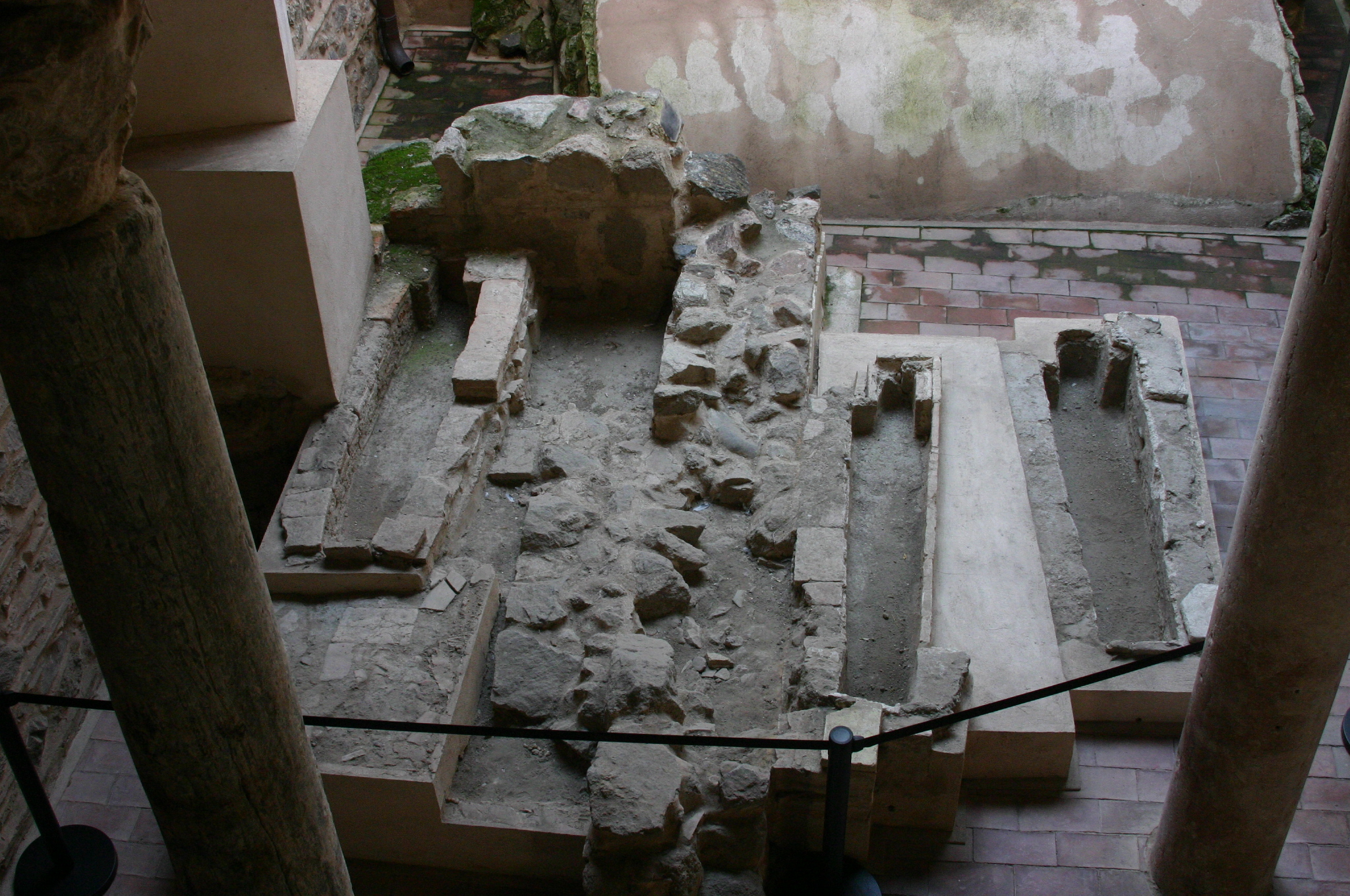 Iglesia del Salvador